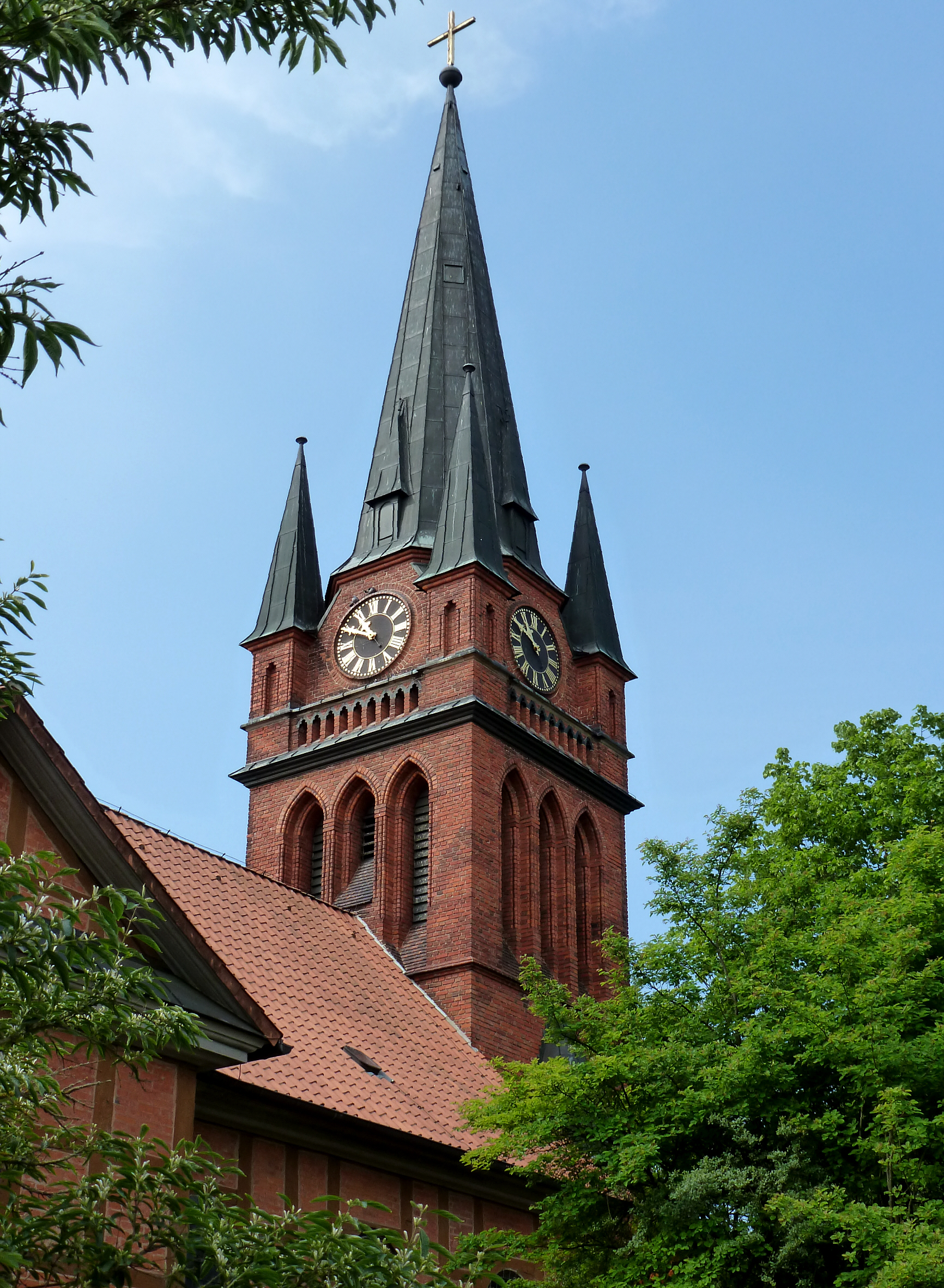 Kirchturm und Kirchenschiff der Hippolit-Kirche in Amelinghausen, Niedersachsen, Deutschland. Die Kirche wurde benannt nach dem Märtyrer Hippolit im Rom des 3. Jahrhunderts. Er ist Namensgeber dieser Kirche seit über 1.000 Jahren.